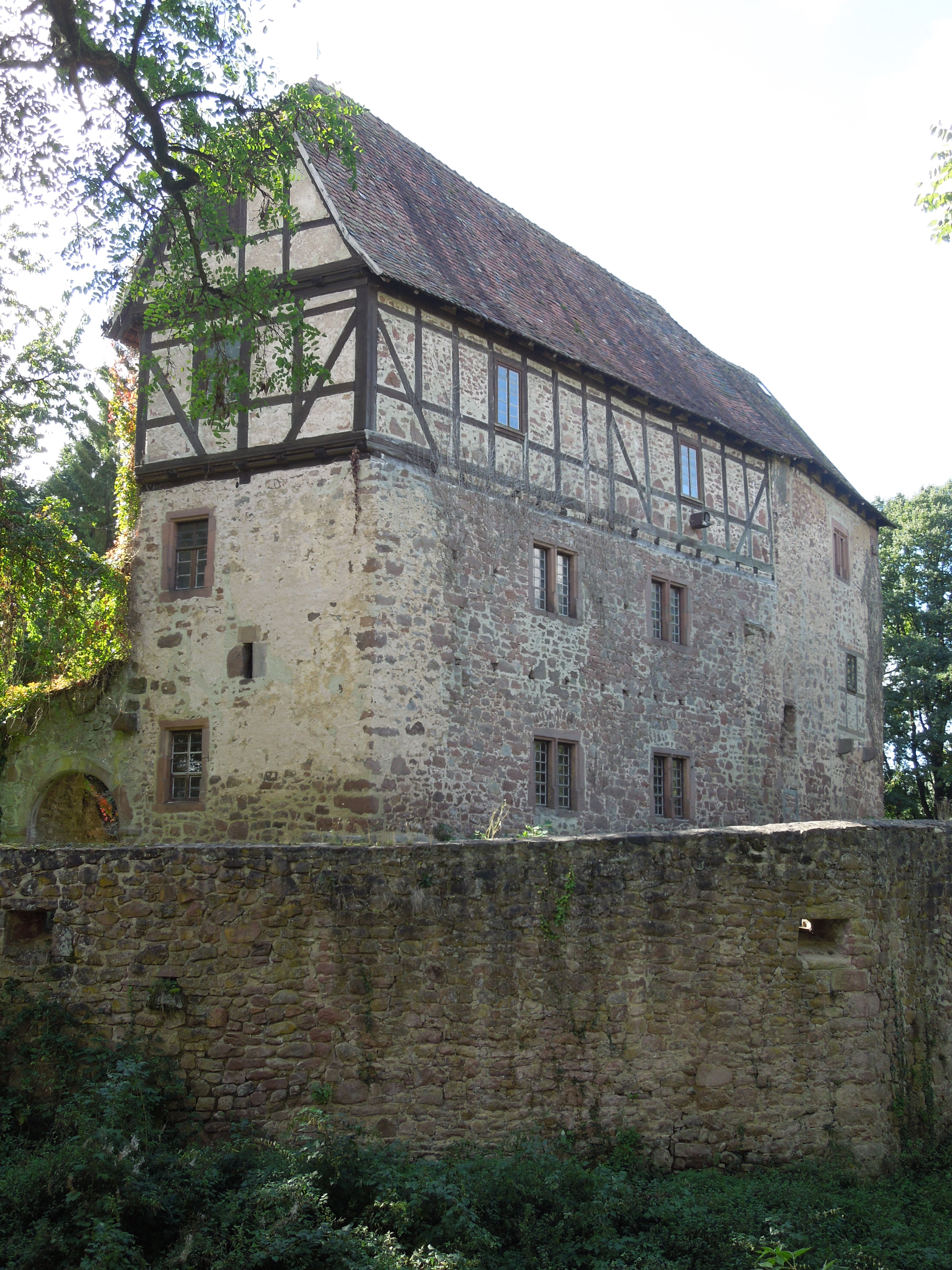 Der Palas ("Langer Bau") der Urff'schen Burg in Niederurff, gesehen von Nordosten